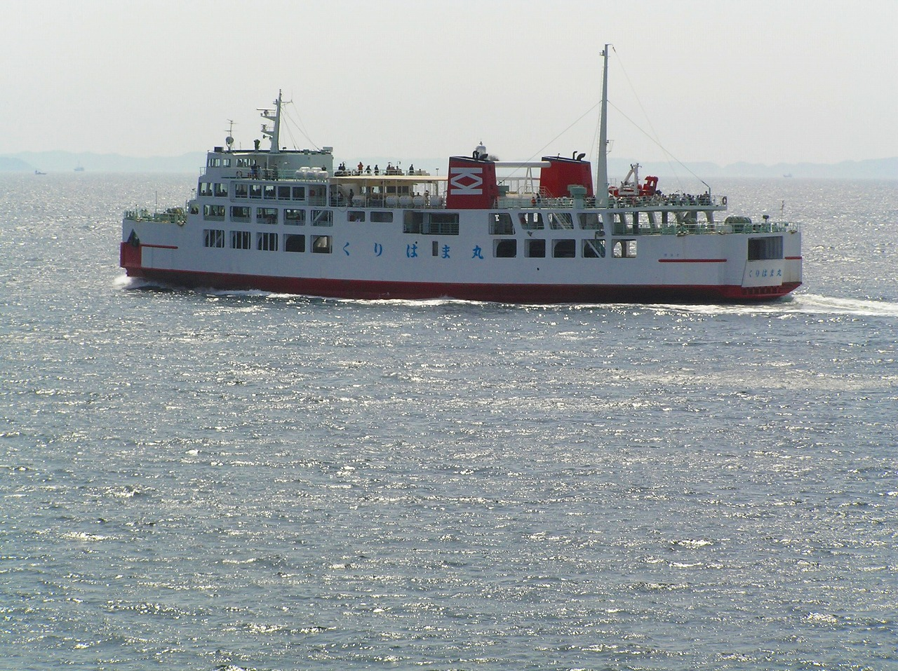 航行中の東京湾フェリー「くりはま丸」